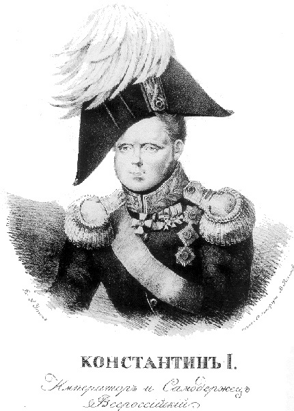 Константин I император и самодержец Всероссийский. Литография А. Уткина. Декабрь 1825 г.